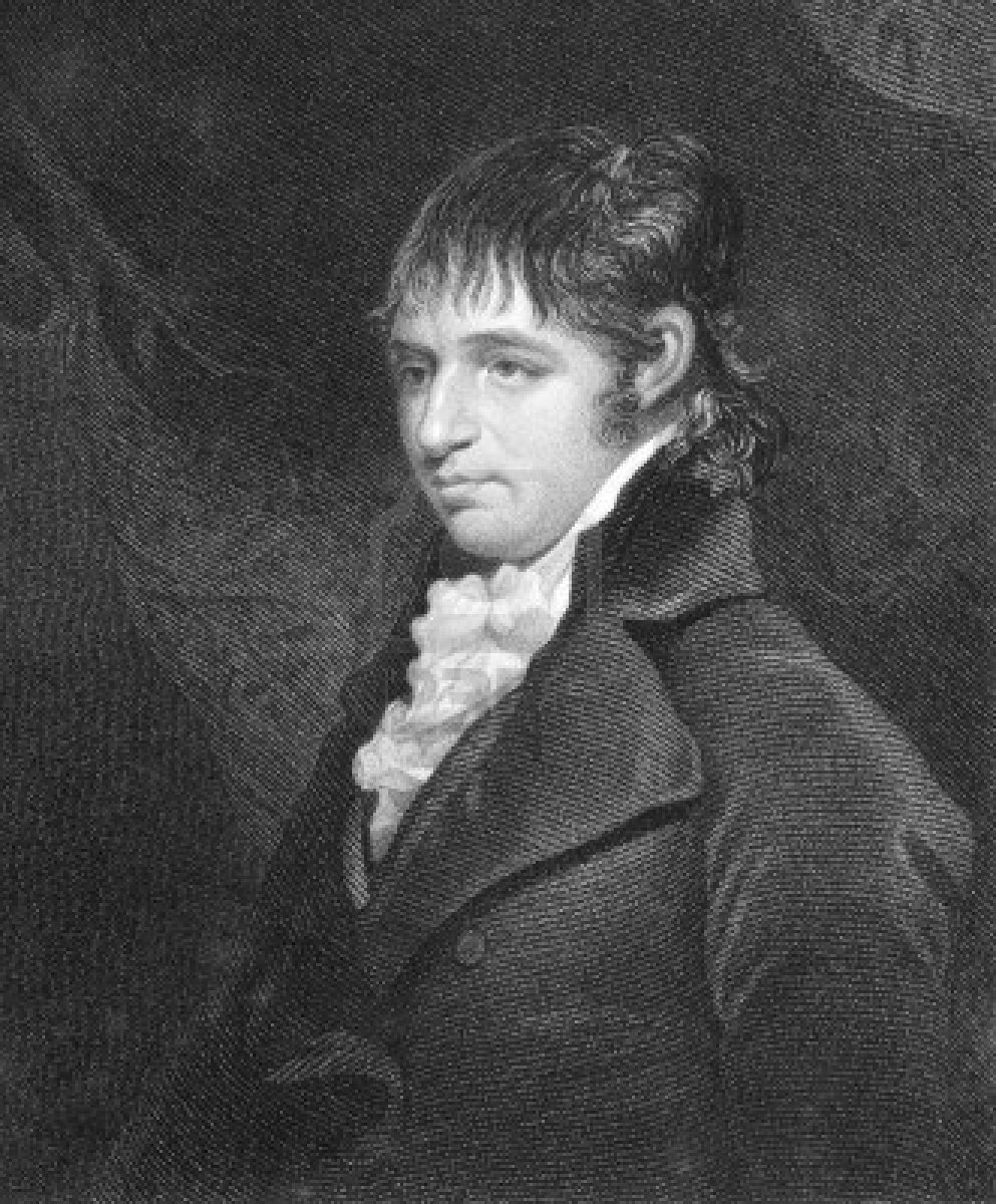 Richard Porson (1759-1808) angol filológus